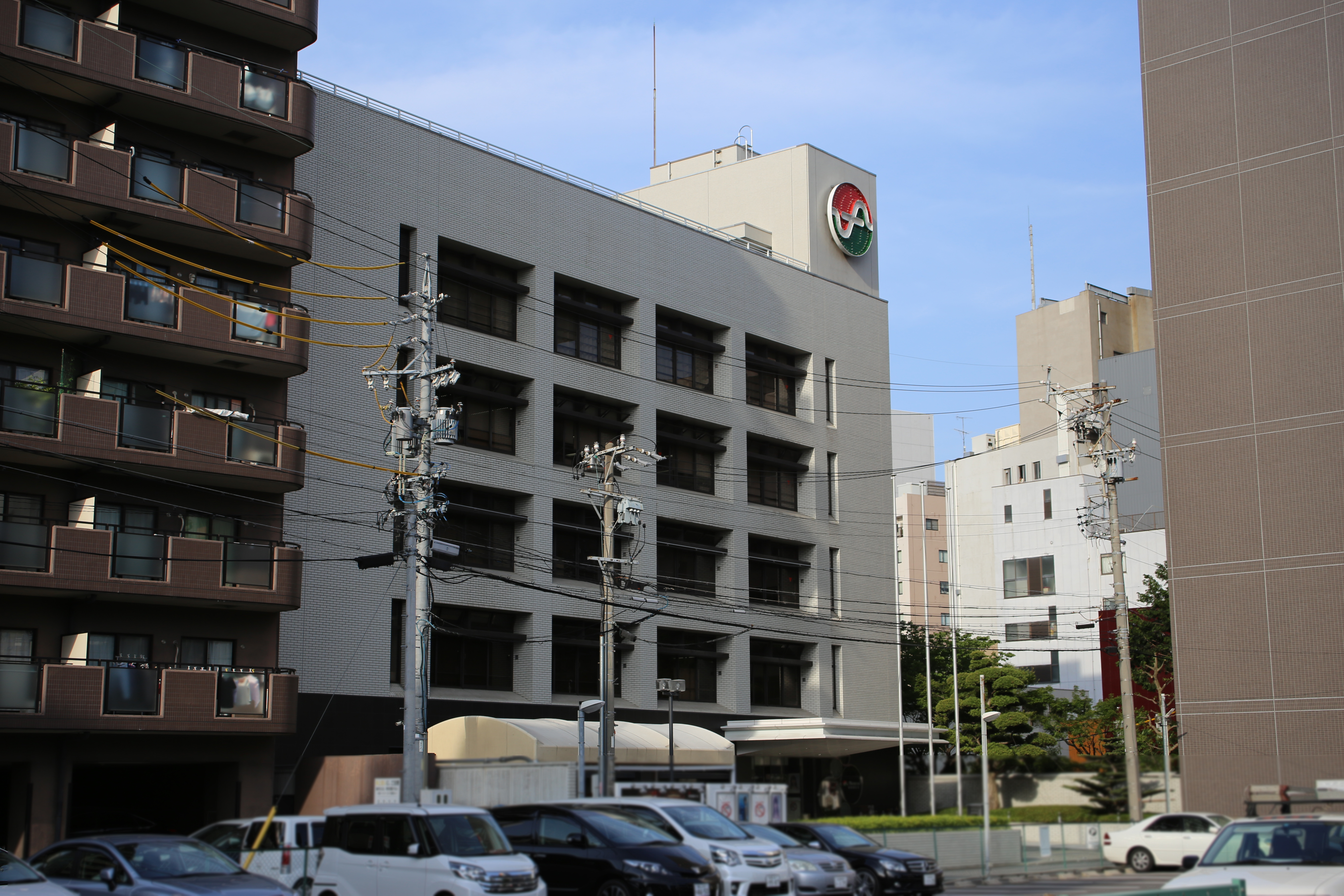 名古屋市中区葵三丁目のメニコンアネックスを南側公道西側より撮影。ただし、画面下部につき画像処理済み。